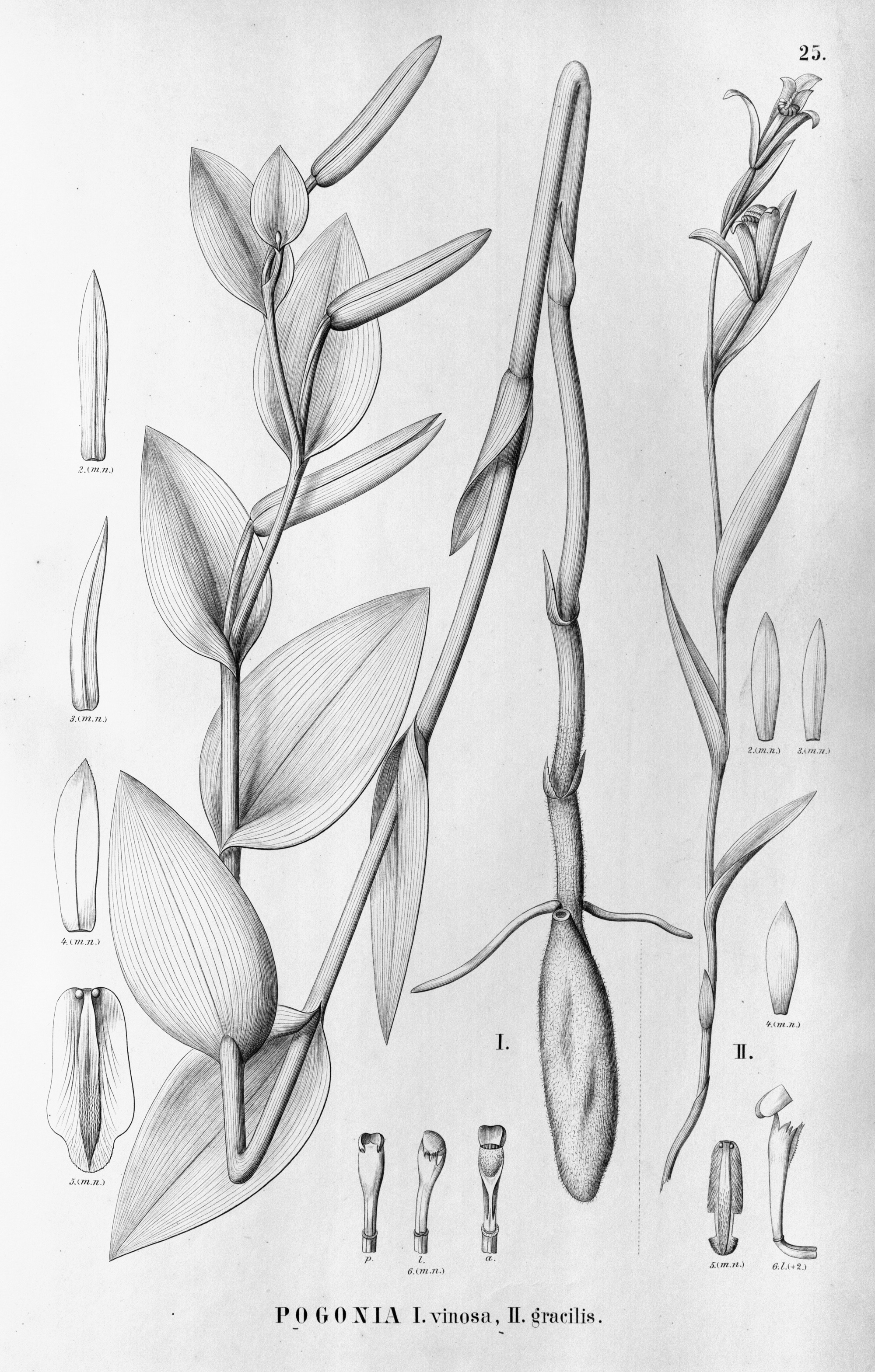 Illustration of : I. Cleistes vinosa (as syn. Pogonia vinosa II. Cleistes rodriguesii (as syn. Pogonia gracilis)